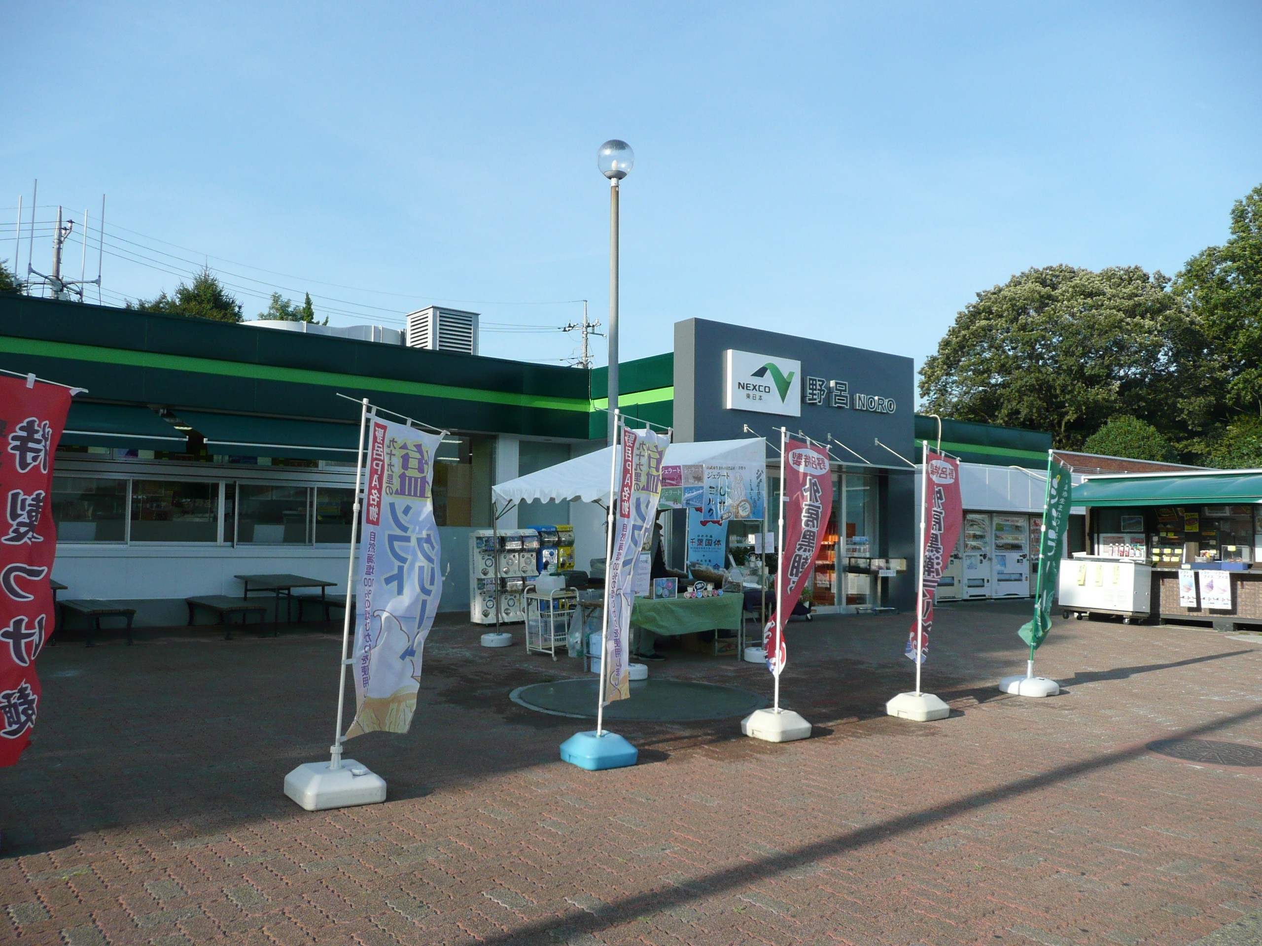 野呂パーキングエリア下り線施設